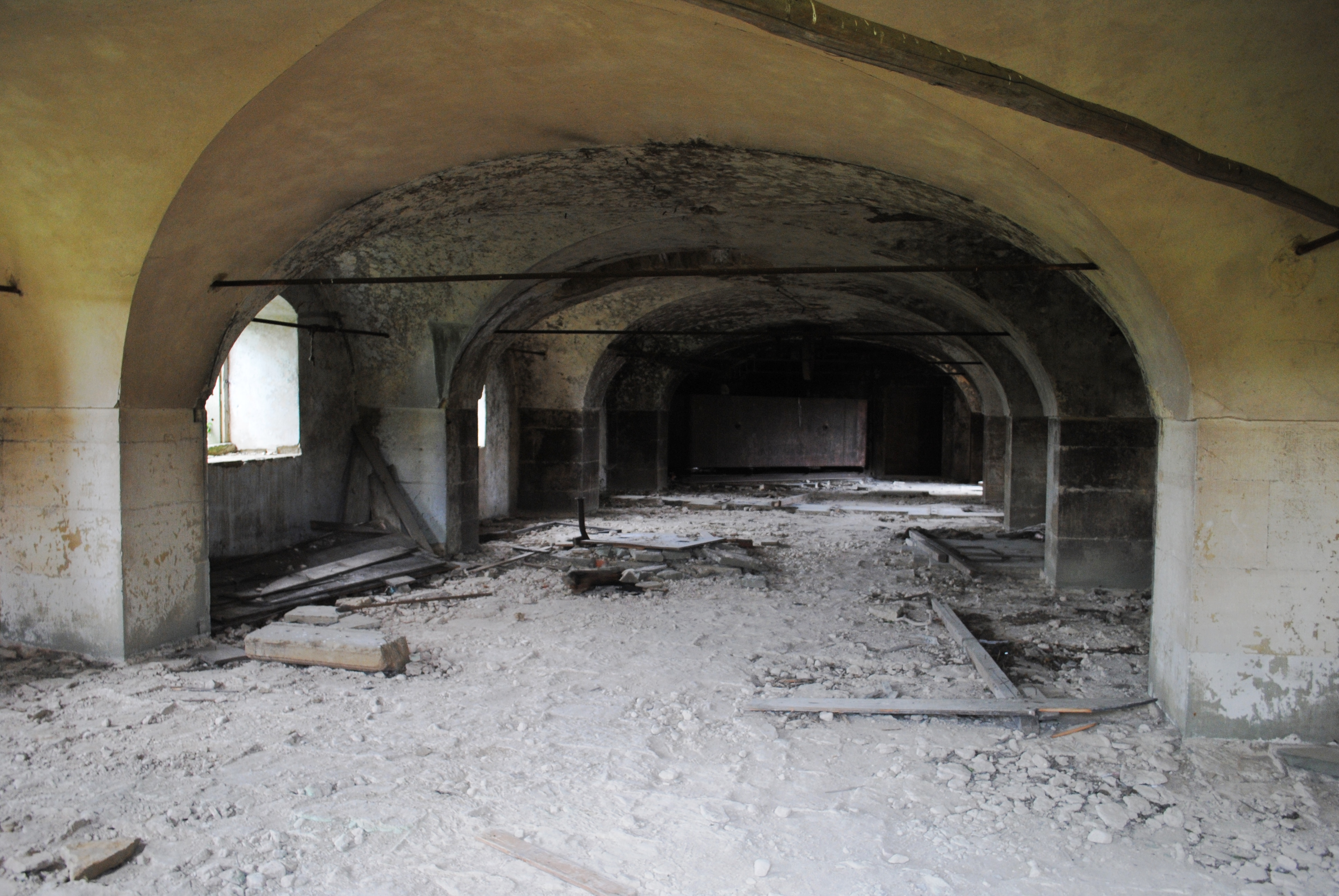 Innenraum, Brennereibau, Gut ÖttershausenThis is a photograph of an architectural monument.